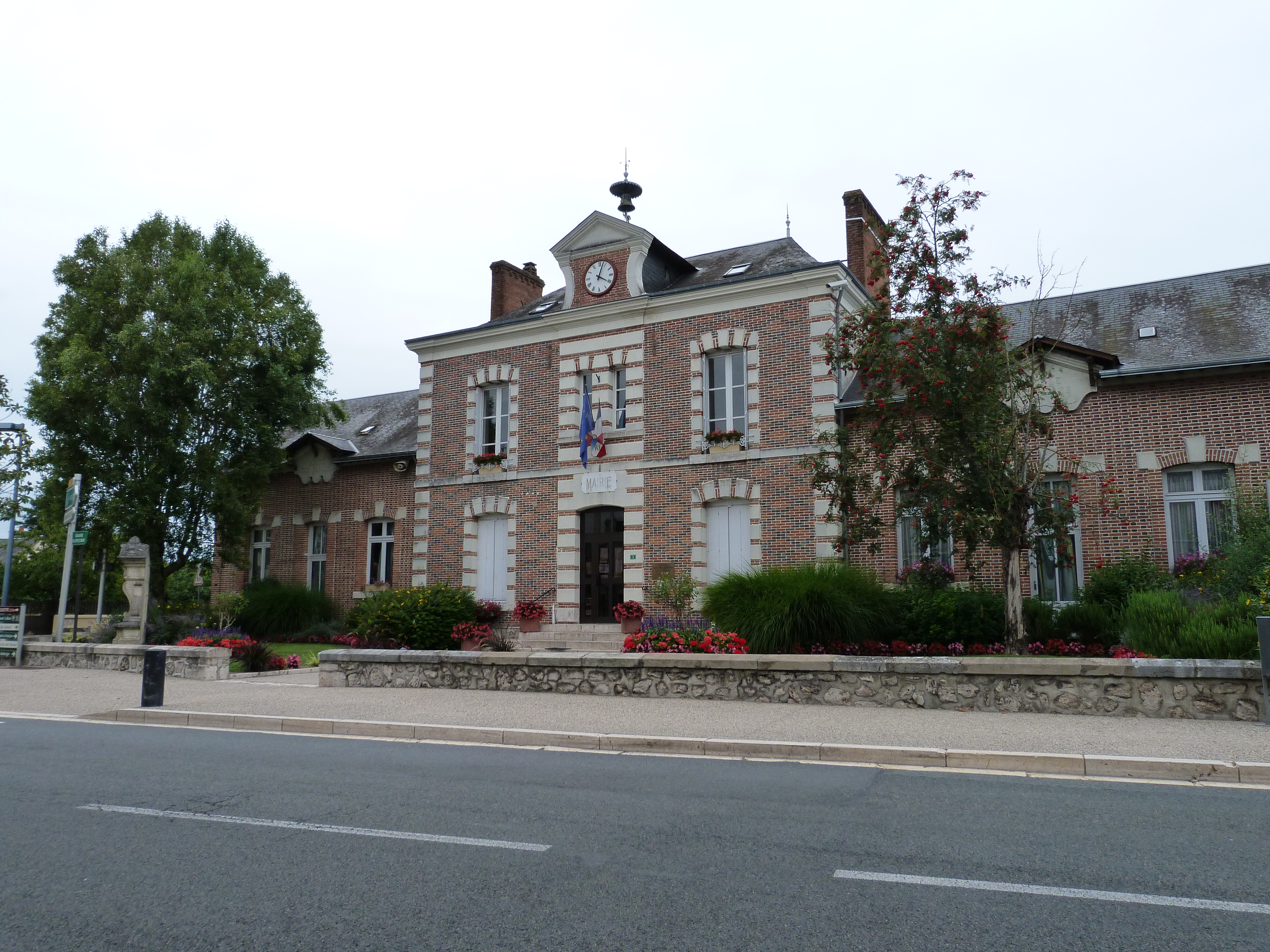 Mairie de Mur-de-Sologne